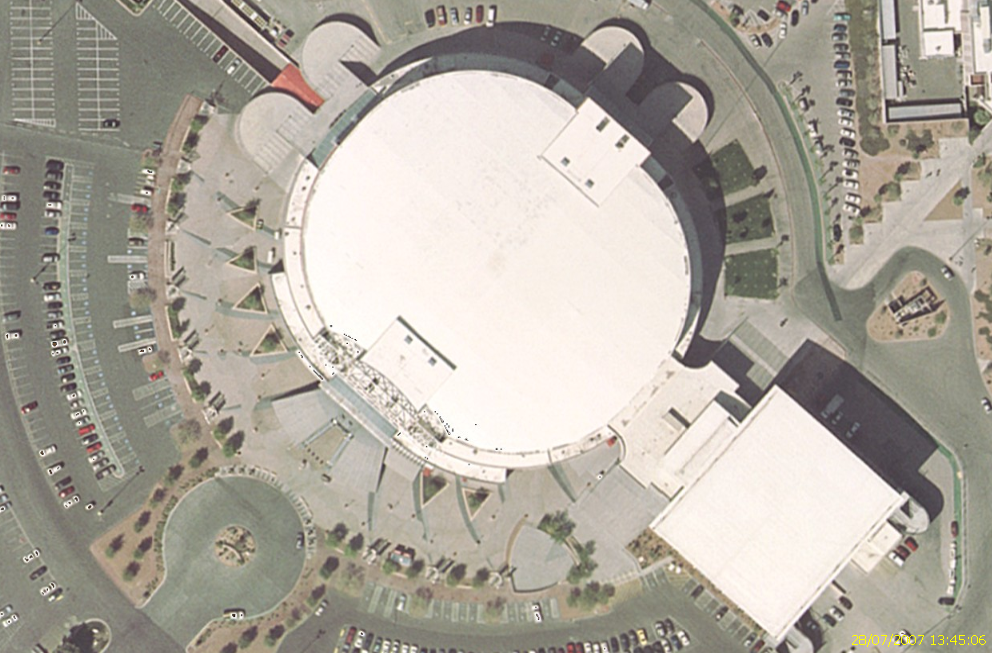 Image satellite du Thomas & Mack Center de Las Vegas Image USGS provenant de Nasa World Wind